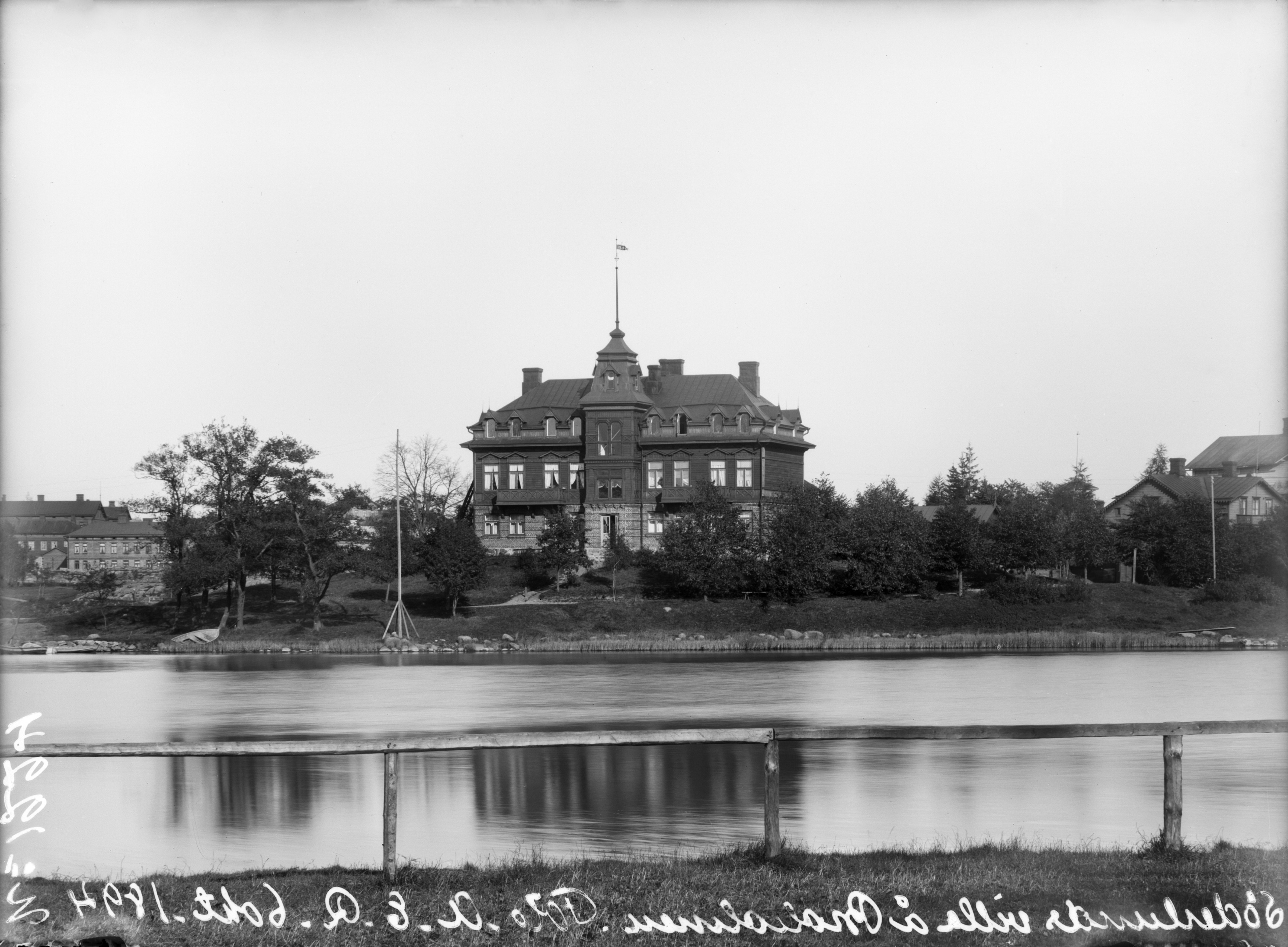 Söderlundin huvila Siltasaaressa, nähtynä Kaisaniemen rannasta.